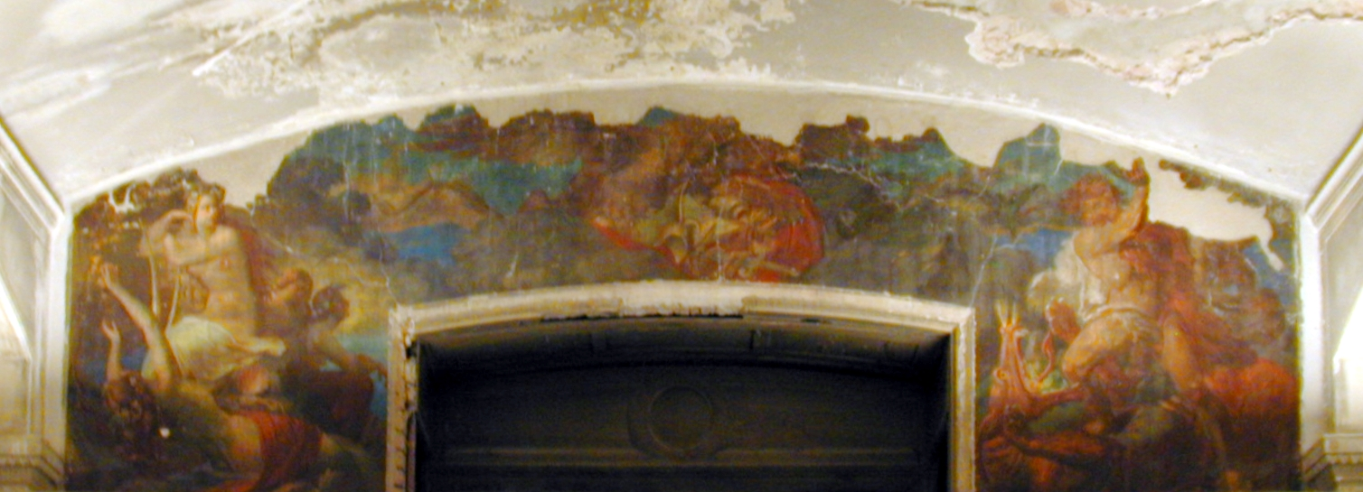 Berlin, Neues Museum - Vaterländischer Saal: Riesen im Kampf gegen Drachen, Nixen